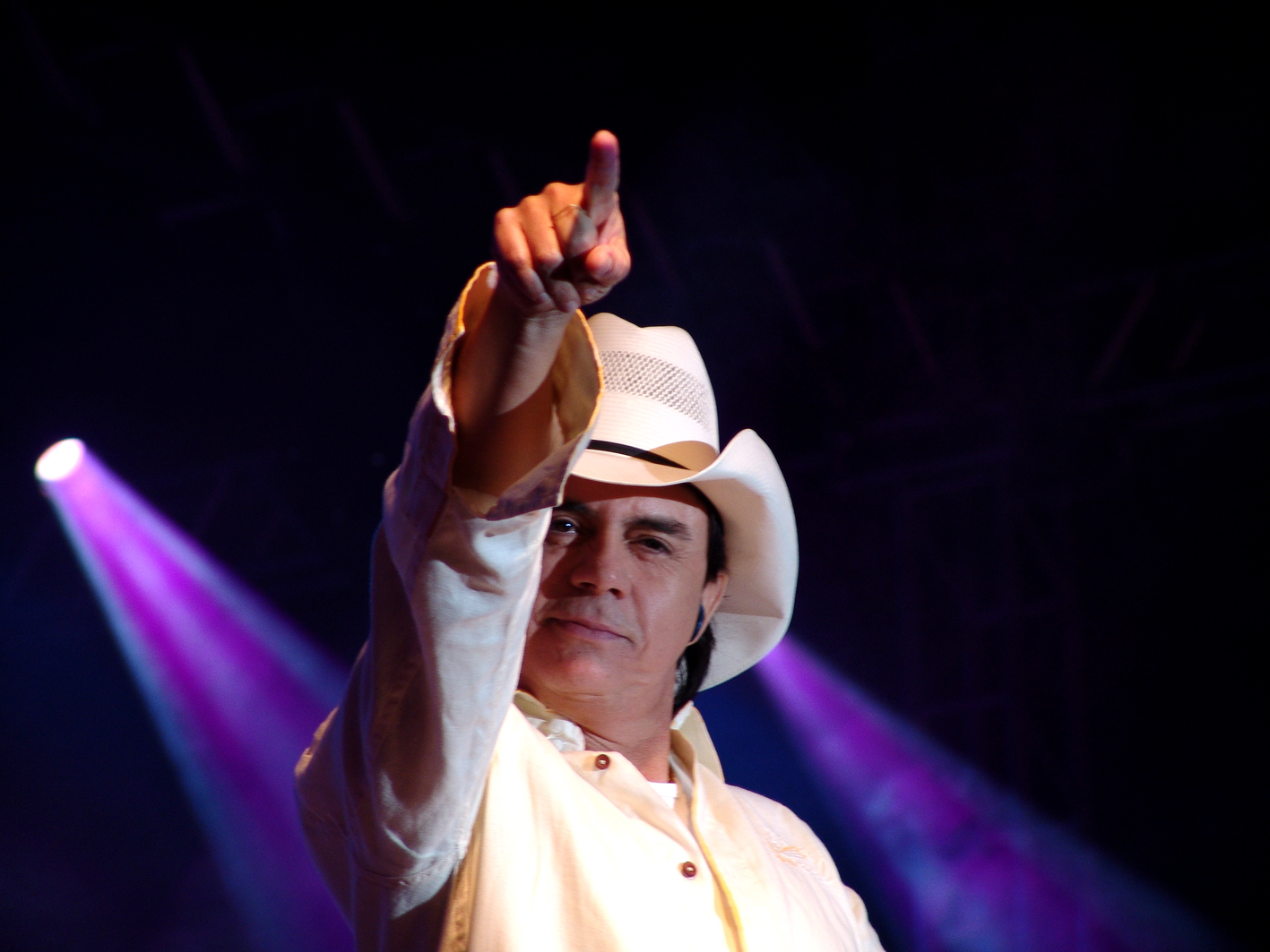 Brazilian singer Chitãozinho, from Chitãozinho & Xororó.DSC00067